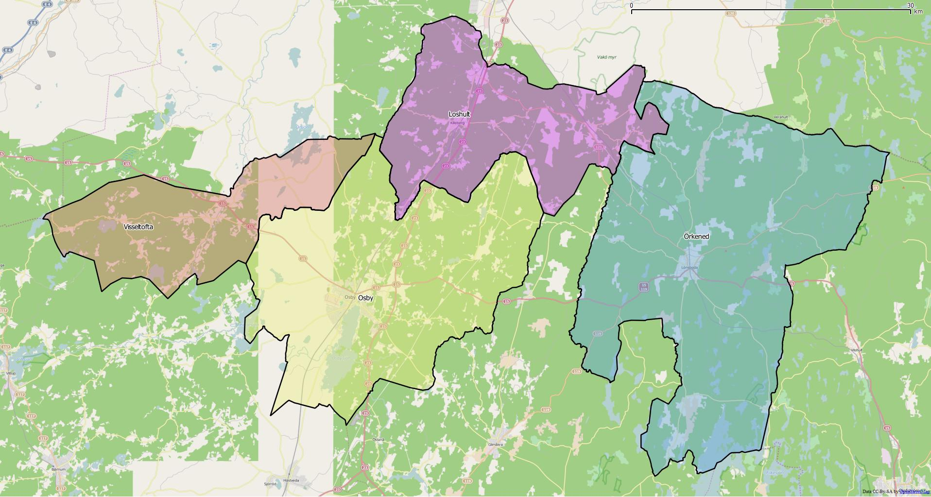 Distriktsindelningen i Osby kommun World file: 52.26207262434007106 0 0 -52.26207262434007106 1520087.65096248220652342 7666946.21031545661389828